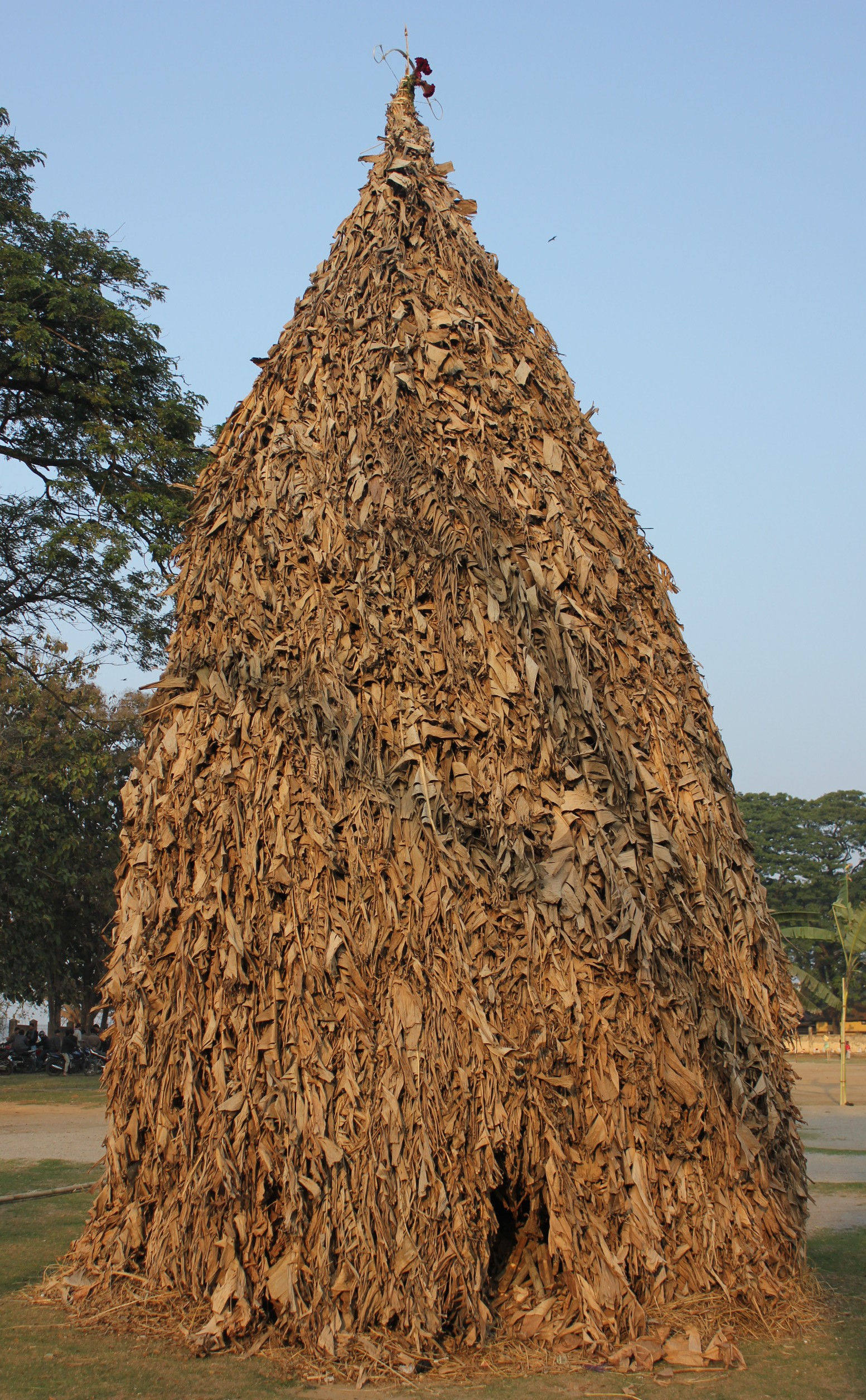 অসমীয়া: গুৱাহাটীৰ ভৰলুমুখৰ সোনাৰাম খেলপথাৰত ভোগালী বিহুৰ মেজি।